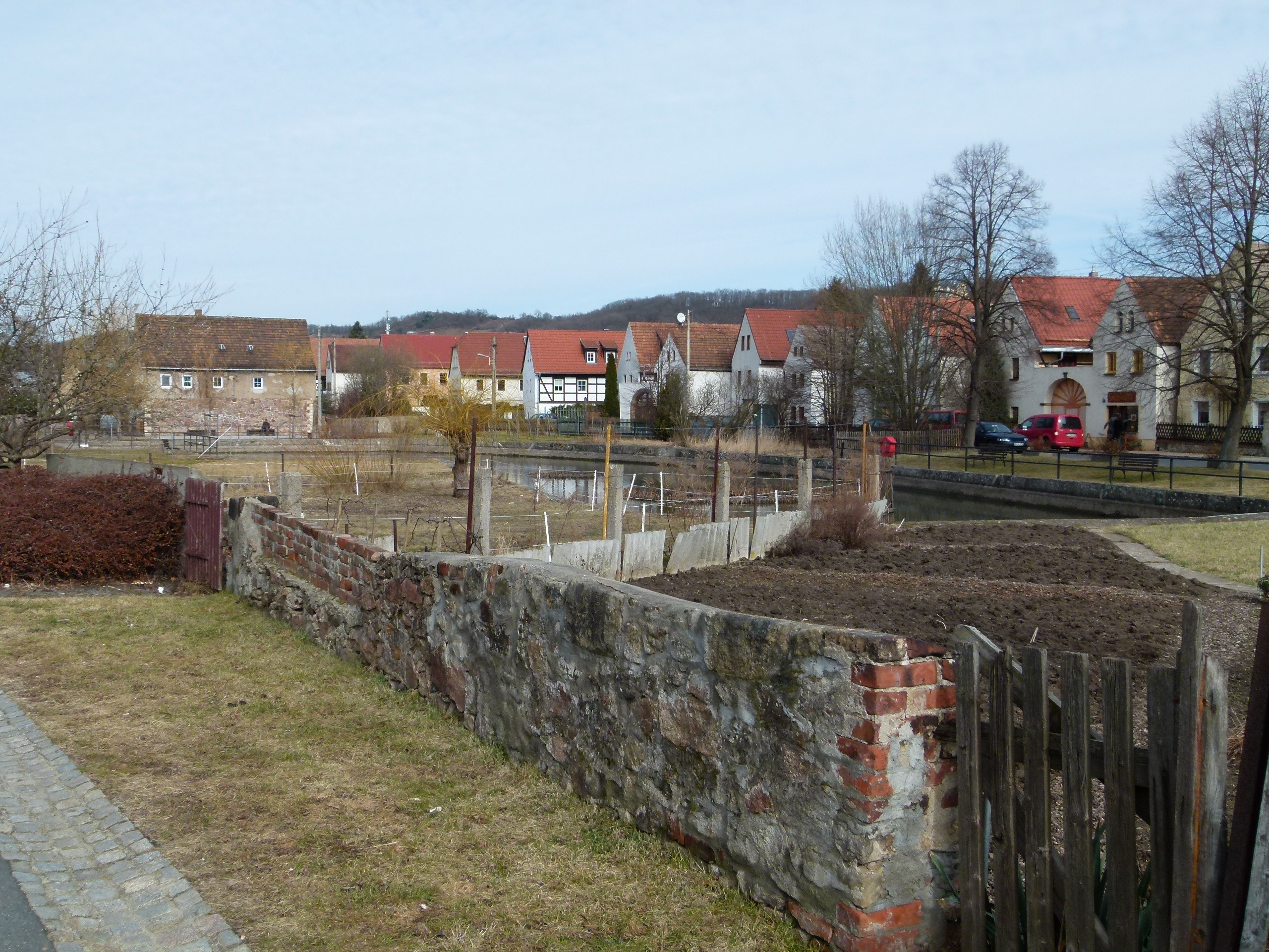 Dorfanger Altnaundorf, Radebeul